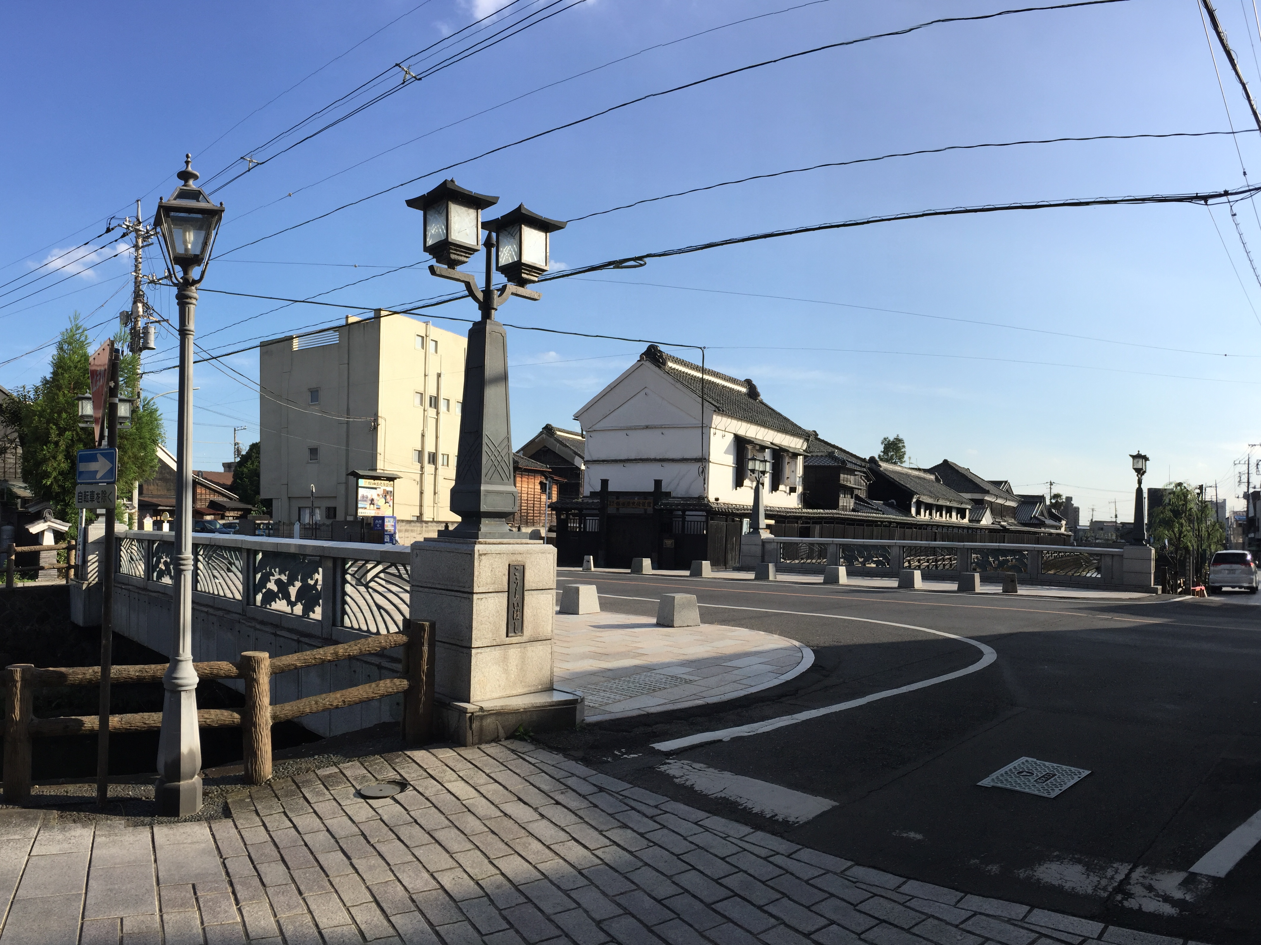 栃木県栃木市の巴波川に架かる幸来橋。北西側から撮影。奥には塚田記念伝説館が見える。